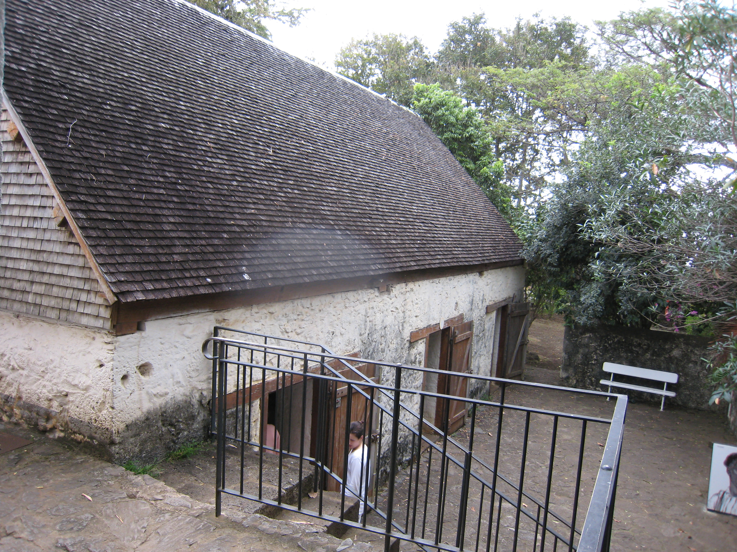 Maison des esclaves du musée de Villèle, à Saint-Paul de La Réunion.